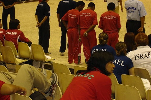 Pétanque Championnats du monde à Grenoble